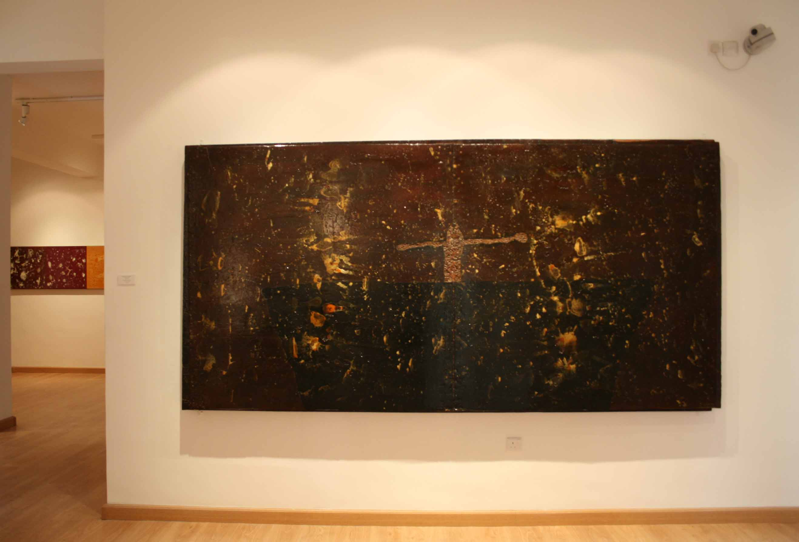 Exposición de Lamazares en la Galería Nacional de Jordania, Amman